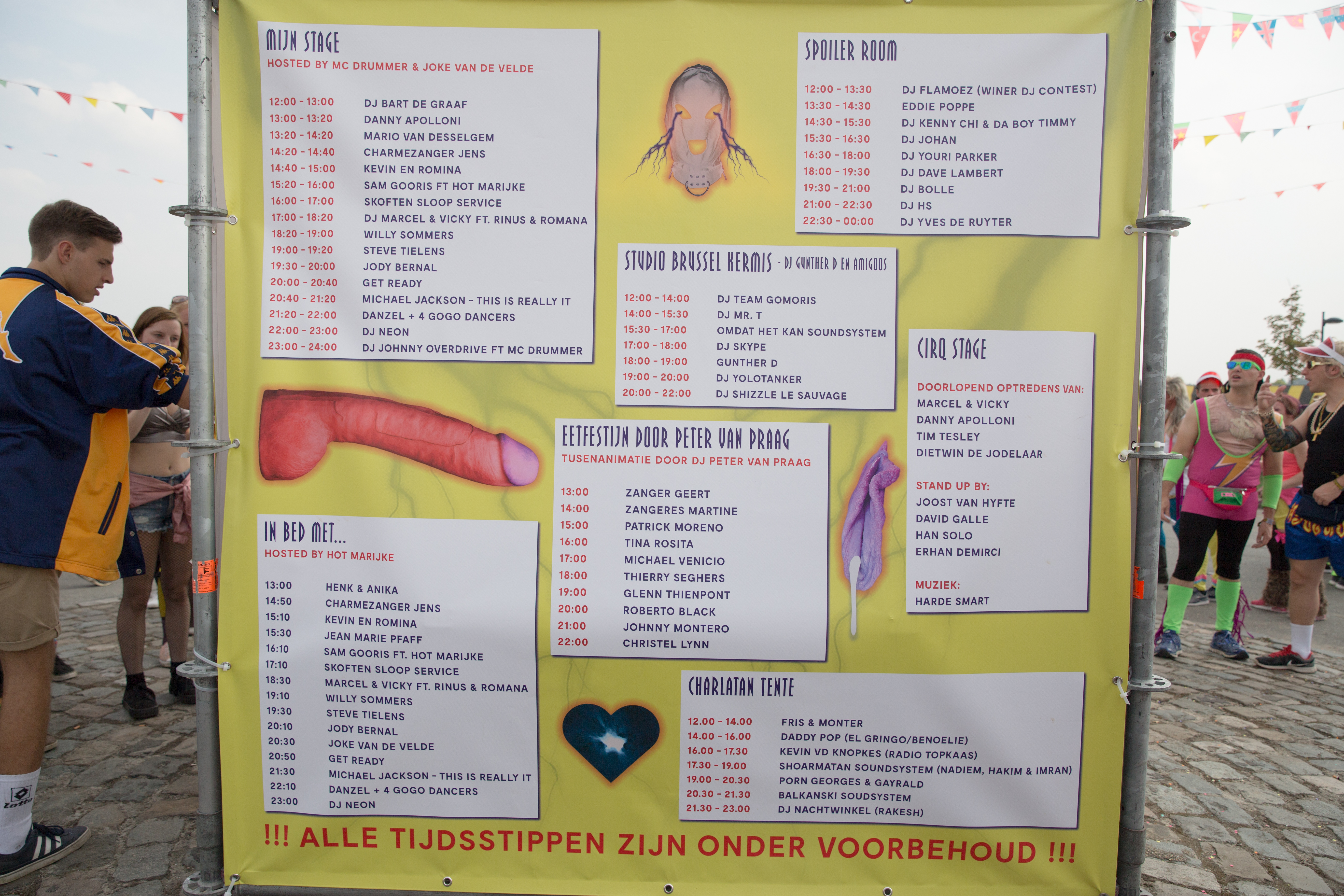 De line-up van Kamping Kitsch Club 2017